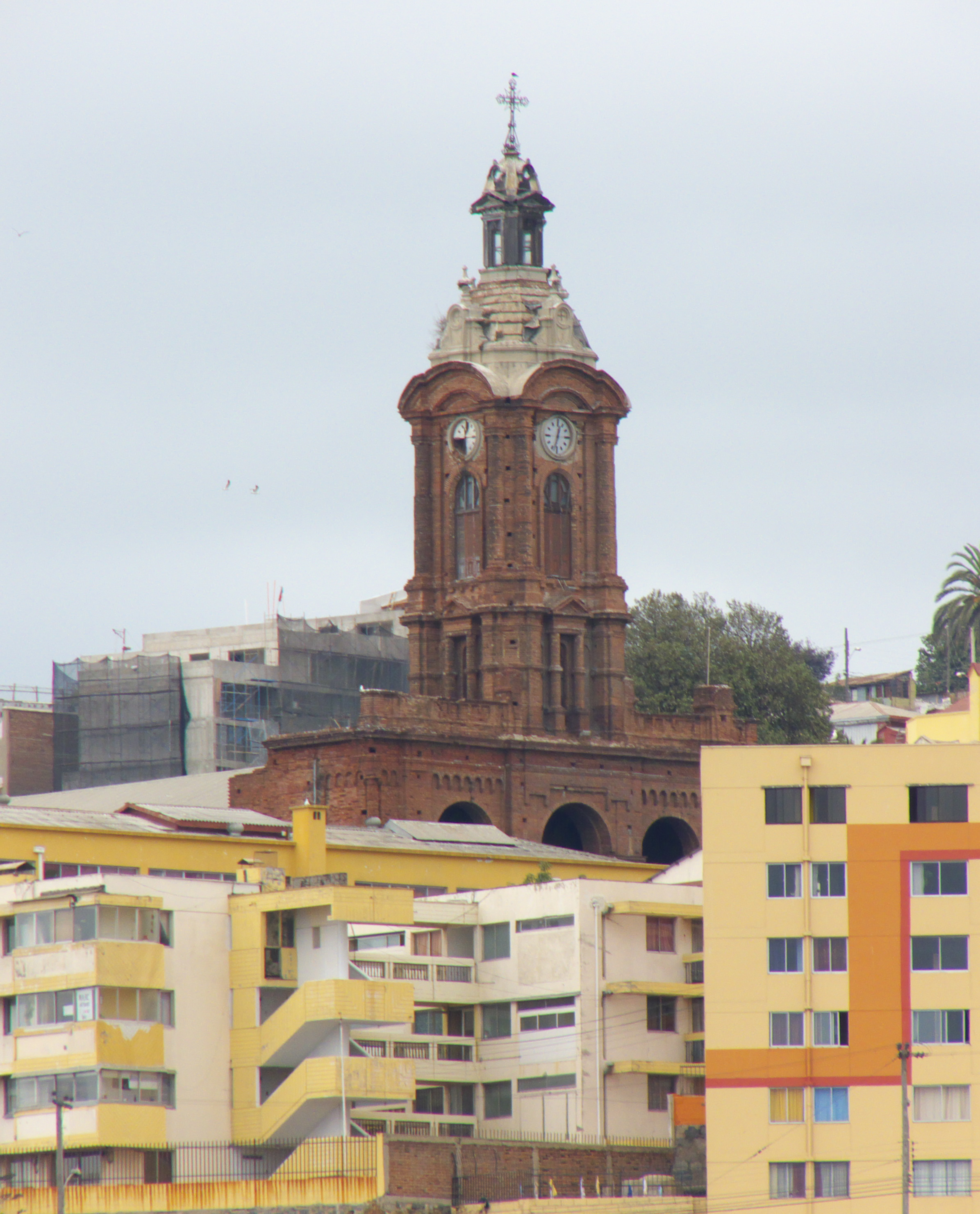 Iglesia de San Francisco, Cerro Barón, Valparaíso, Chile